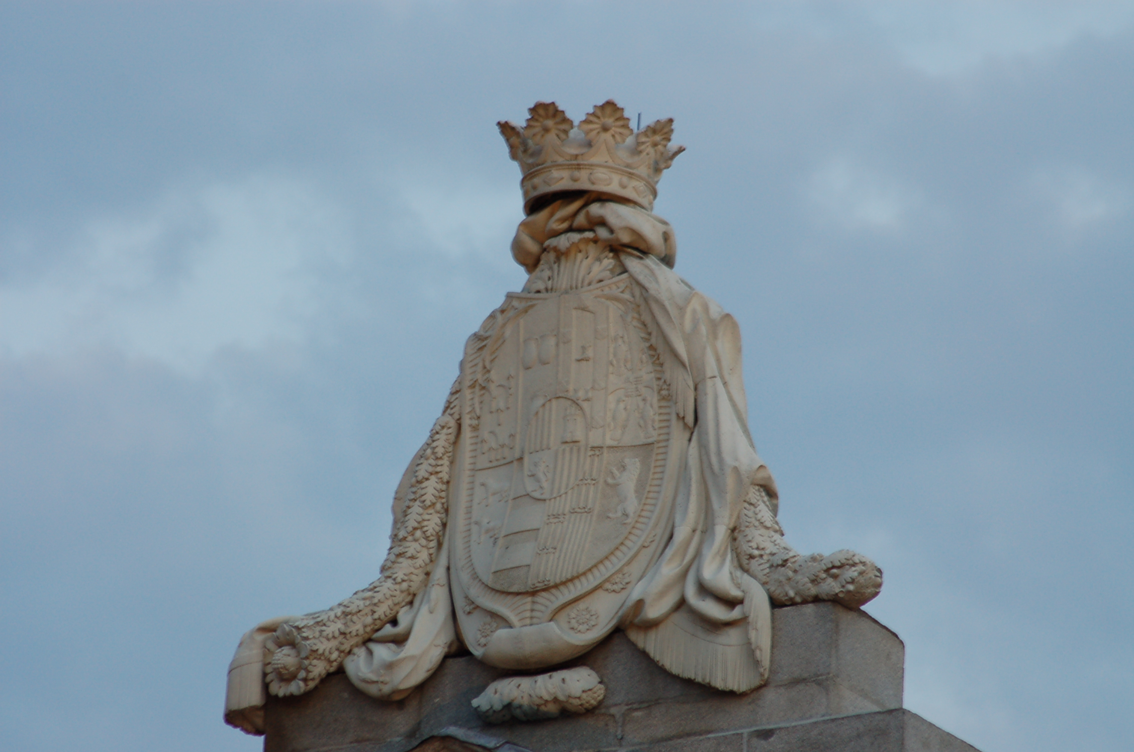 escudo de los duques de villahermosa